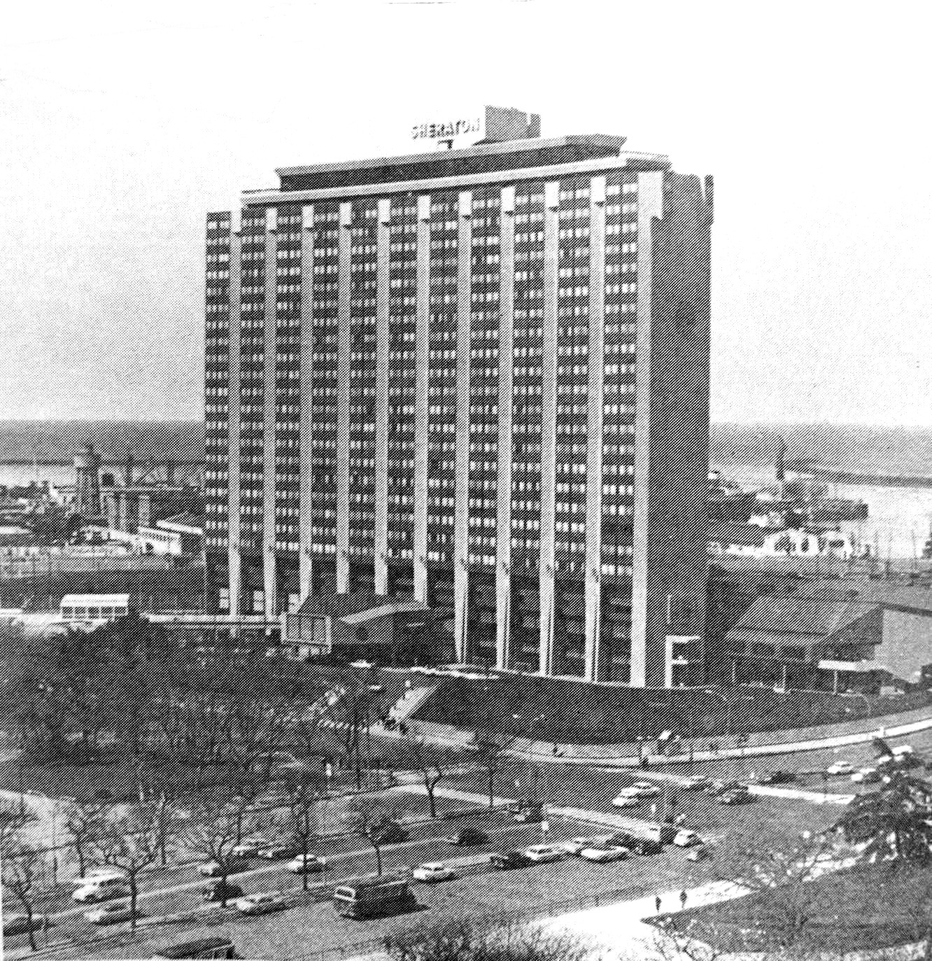 El "Sheraton Buenos Aires Hotel", diseñado por los arquitectos Sánchez Elía, Peralta Ramos y Agostini (Estudio SEPRA) e inaugurado en 1972. Primer edificio del complejo Catalinas Norte, en el barrio de Retiro. Buenos Aires, Argentina.